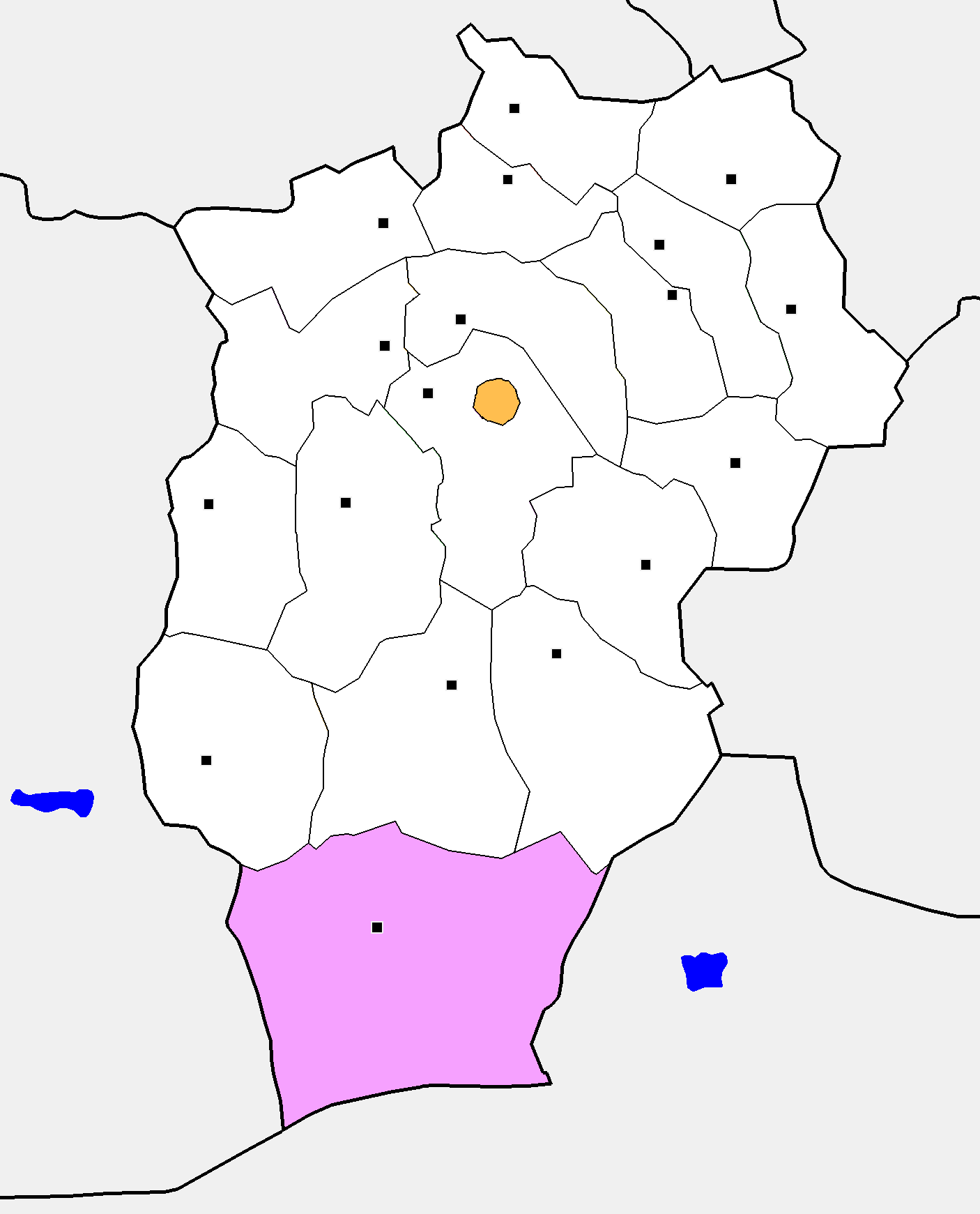 Монгол: Өвөрхангай аймгийн Богд сумын байршил